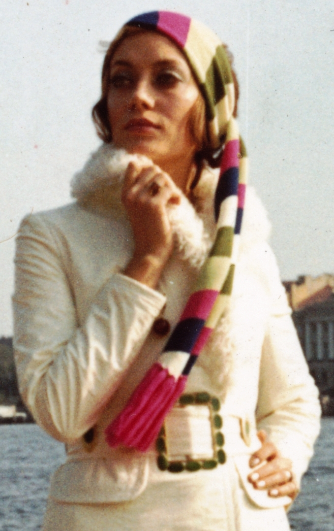 Schmidt Bea magyar modell, fotómodell, manöken.